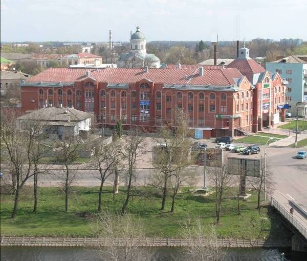 У середмісті Ніжина старі ветхі будівлі хімічного виробництва були знесені, і у 2006 році споруджена будівля Технологічного корпусу з приміщеннями лабораторій, офісу, конференц-залу, банку, ресторану та готелю загальною площею 4900 м2.